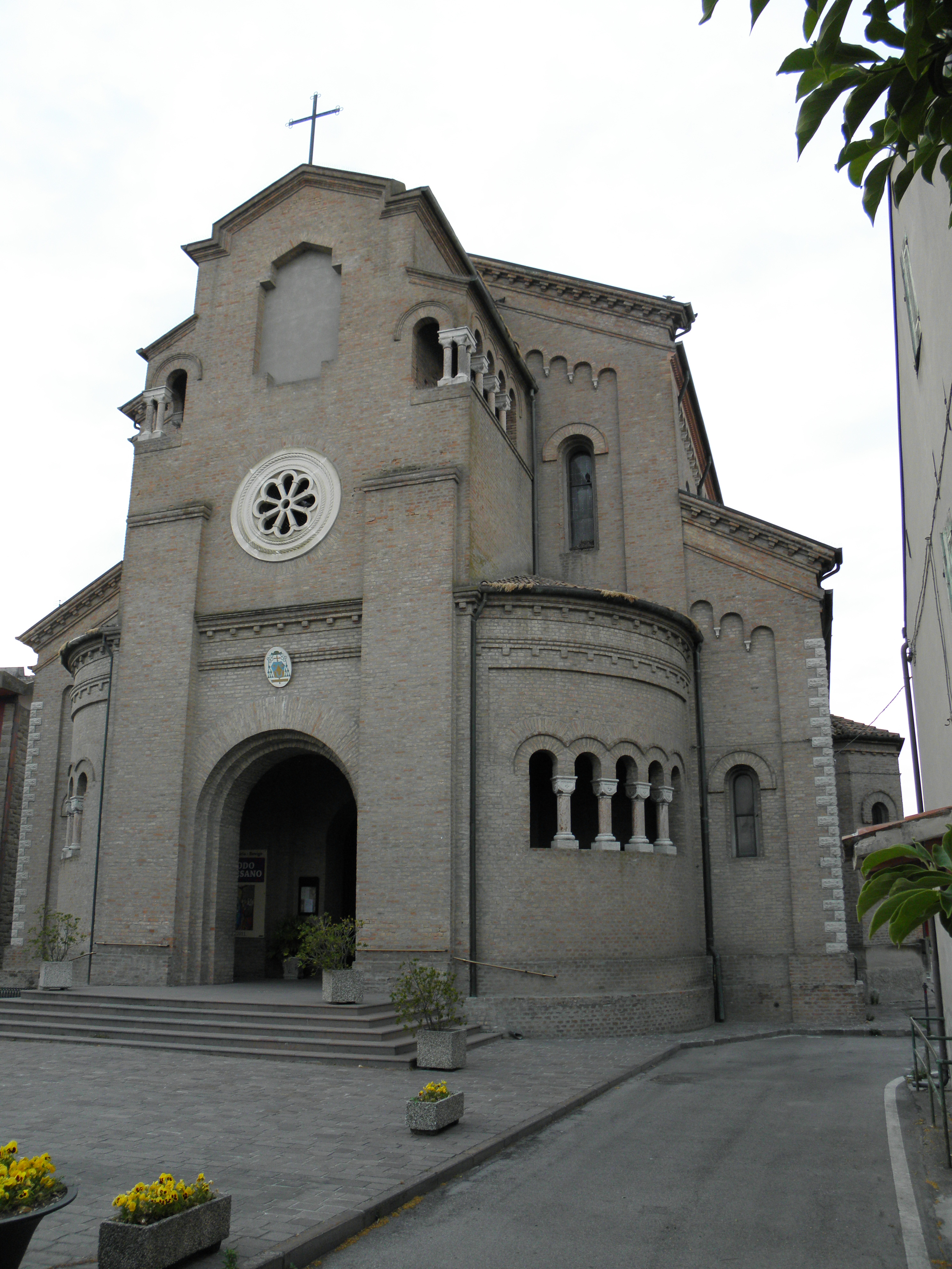 Corbola: la chiesa parrocchiale di Santa Maria Maddalena edificata nei primi decenni del XX secolo.